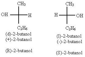 enantiomeros representador por proyeccion de fisher